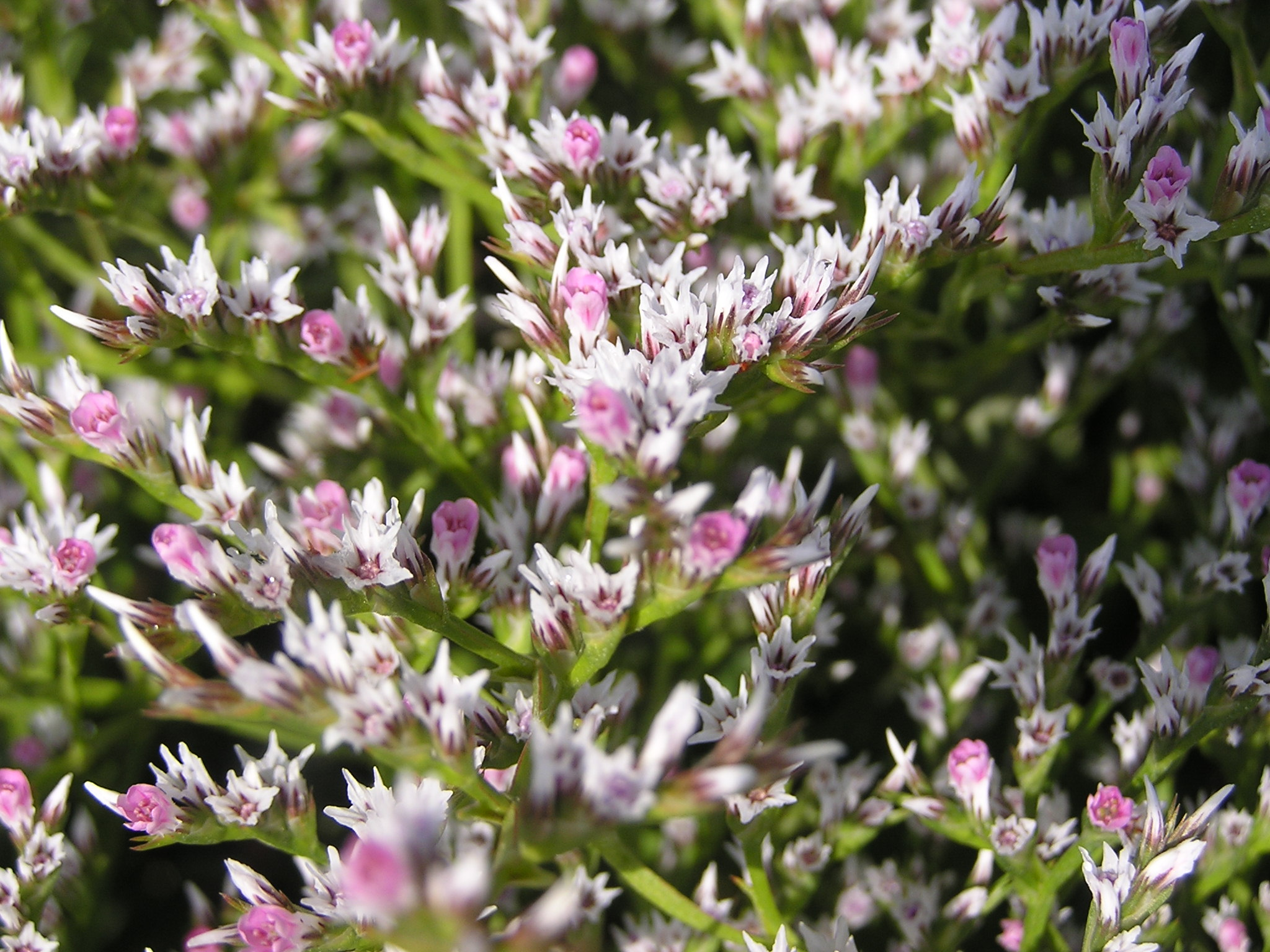 Растение